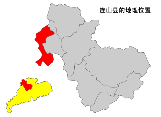 内容介绍：连山县在清远地图上的标示 原创者：zhuwq 创作日期：2005年1月 创作方法：将广东地图用扫描仪输入电脑，再将图片导入FLASH，用画笔描出轮廓，着填充，删除原图片，导出JPG图象便大工告成，这样制作的优点是，开始辛苦了点，但绘制别的市便替换颜色即可。